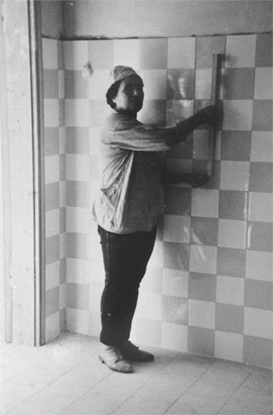 ירושלים - בניה.